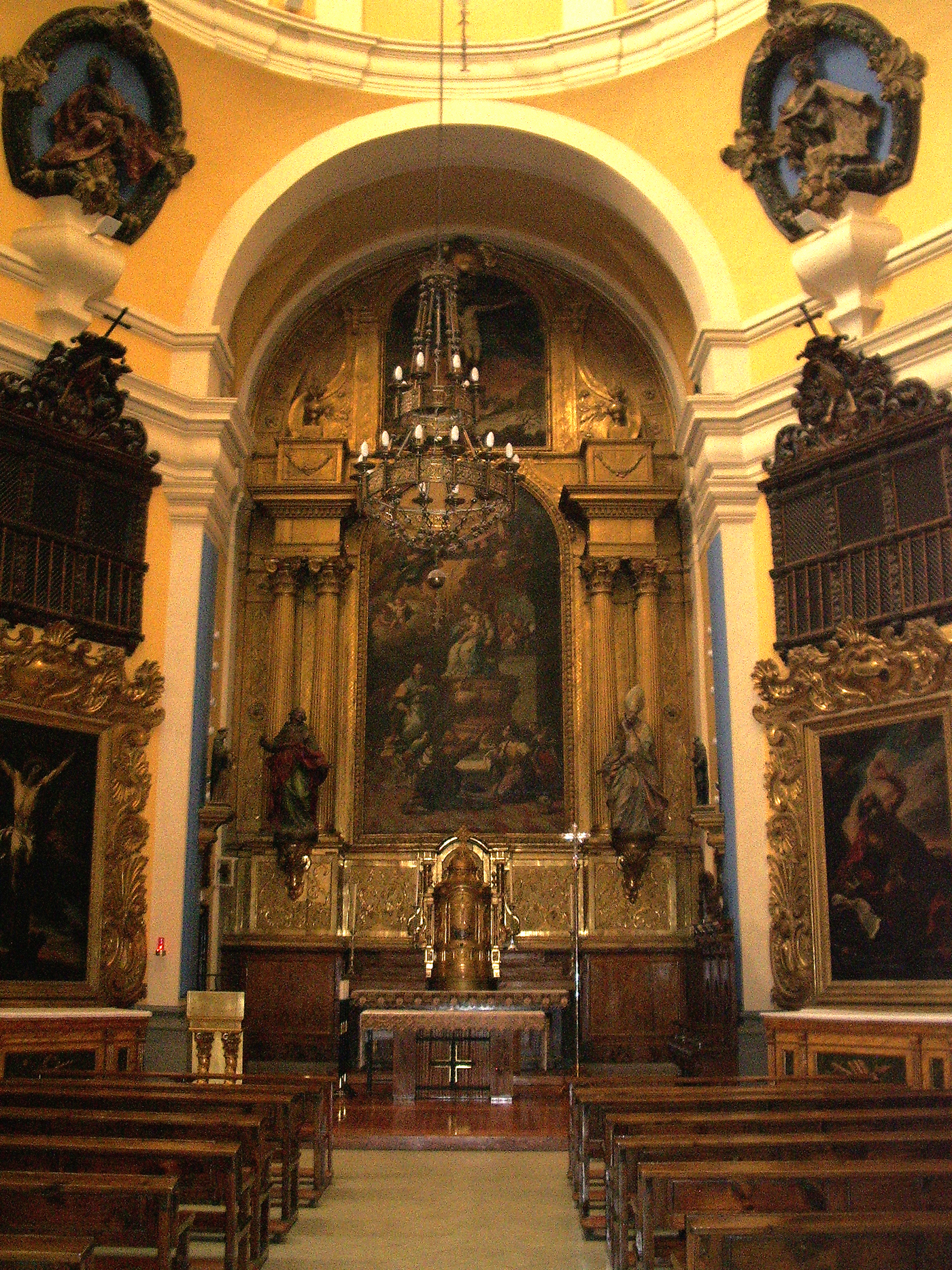 Interior iglesia del hospital de Nuestra Señora de Gracia (Zaragoza, España)